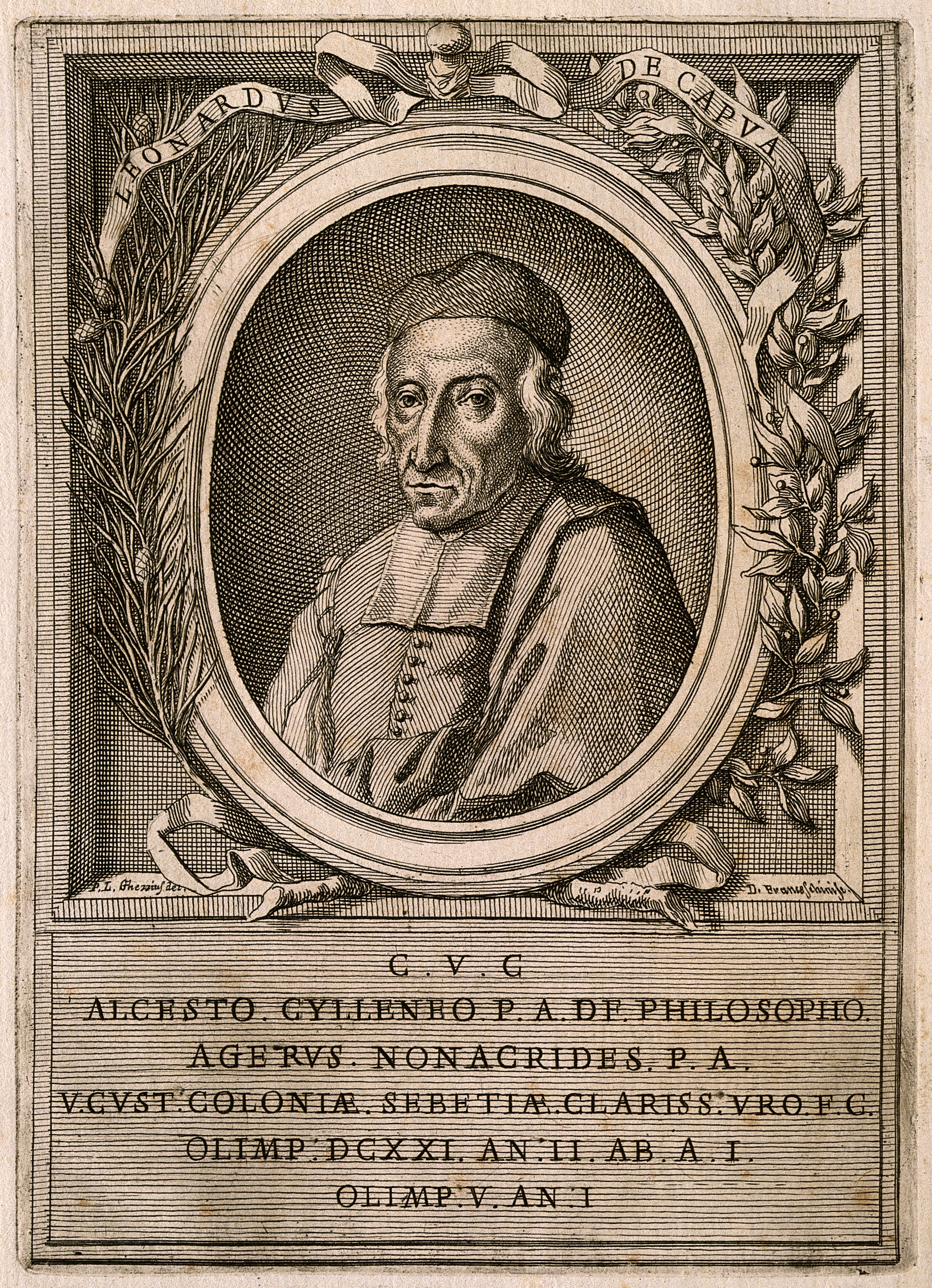 Lionardo di Capoa. Line engraving by D. Franceschini after P. L. Ghezzi. Iconographic Collections Keywords: engravings; Pier Leone Ghezzi; portrait prints; D. Franceschini; Lionardo di Capoa; capoa, lionardo di, 1617-1695